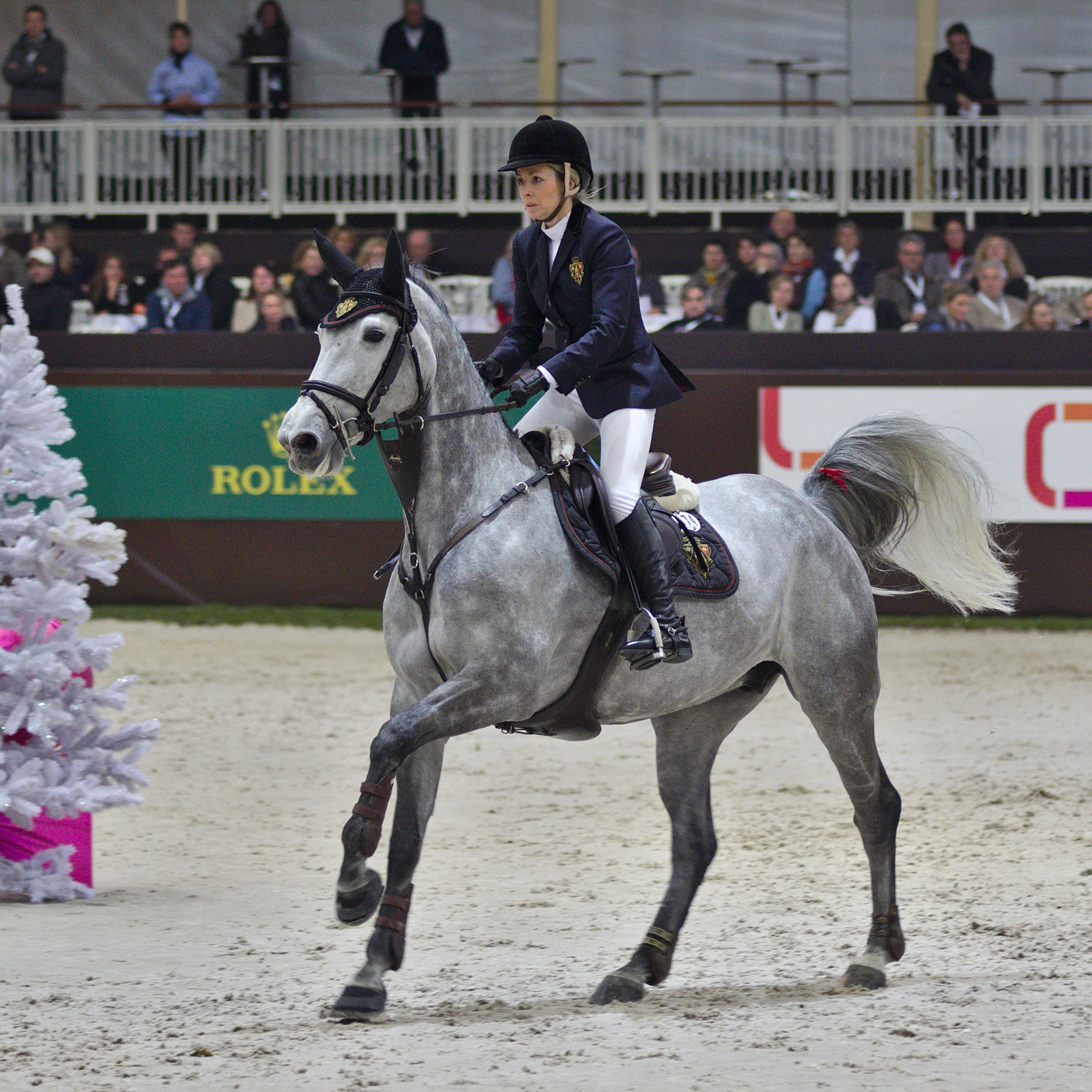 CHI Genève 2013 - 20131212 - Edwina Tops-Alexander et Erenice Horta